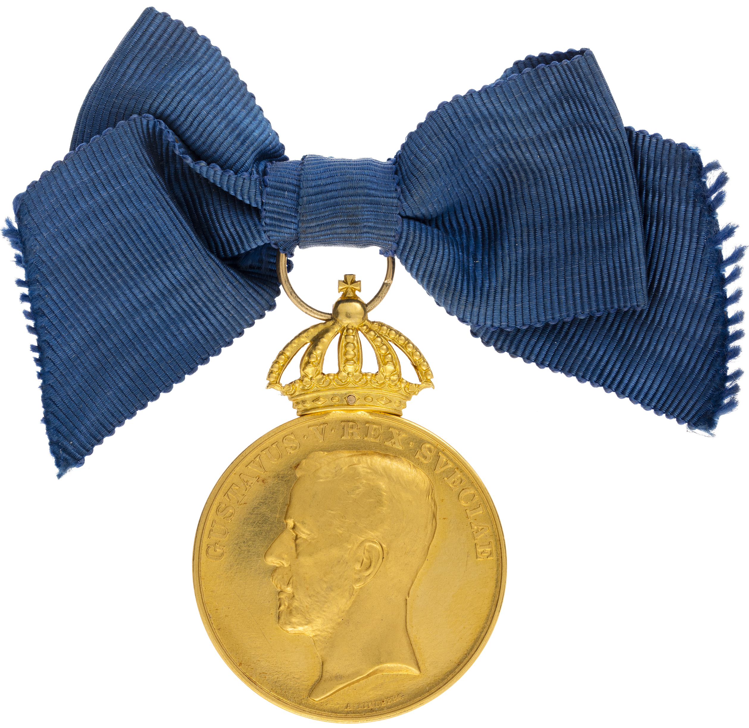 MEDALJEN "LITTERIS ET ARTIBUS" Avers